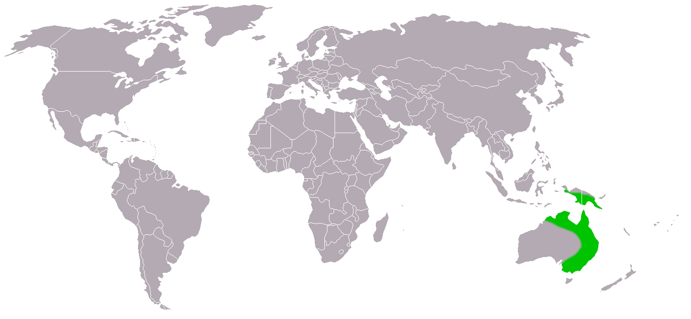 Kurzkopfgleitbeutler (Petaurus breviceps) Source: Self made